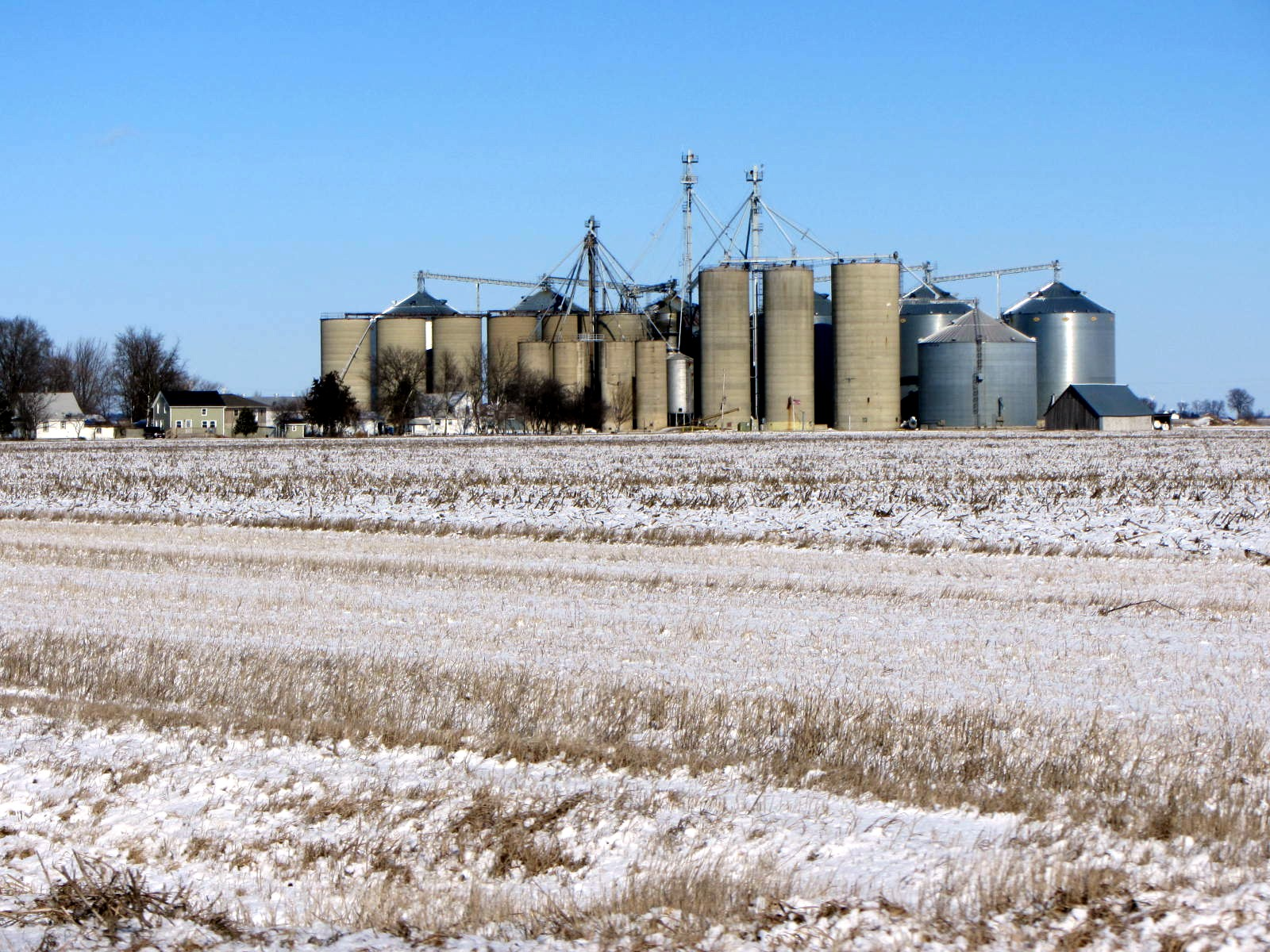 Kasbeer, Illinois grain elevator